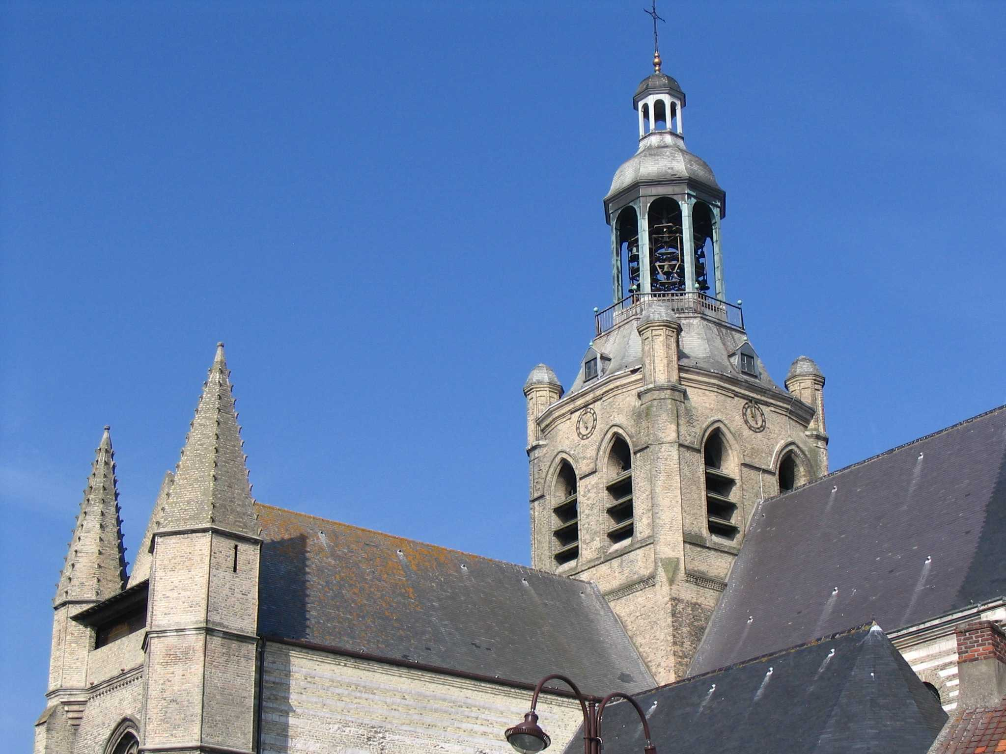 Eglise Saint-Jean-Baptiste. Voir Bourbourg